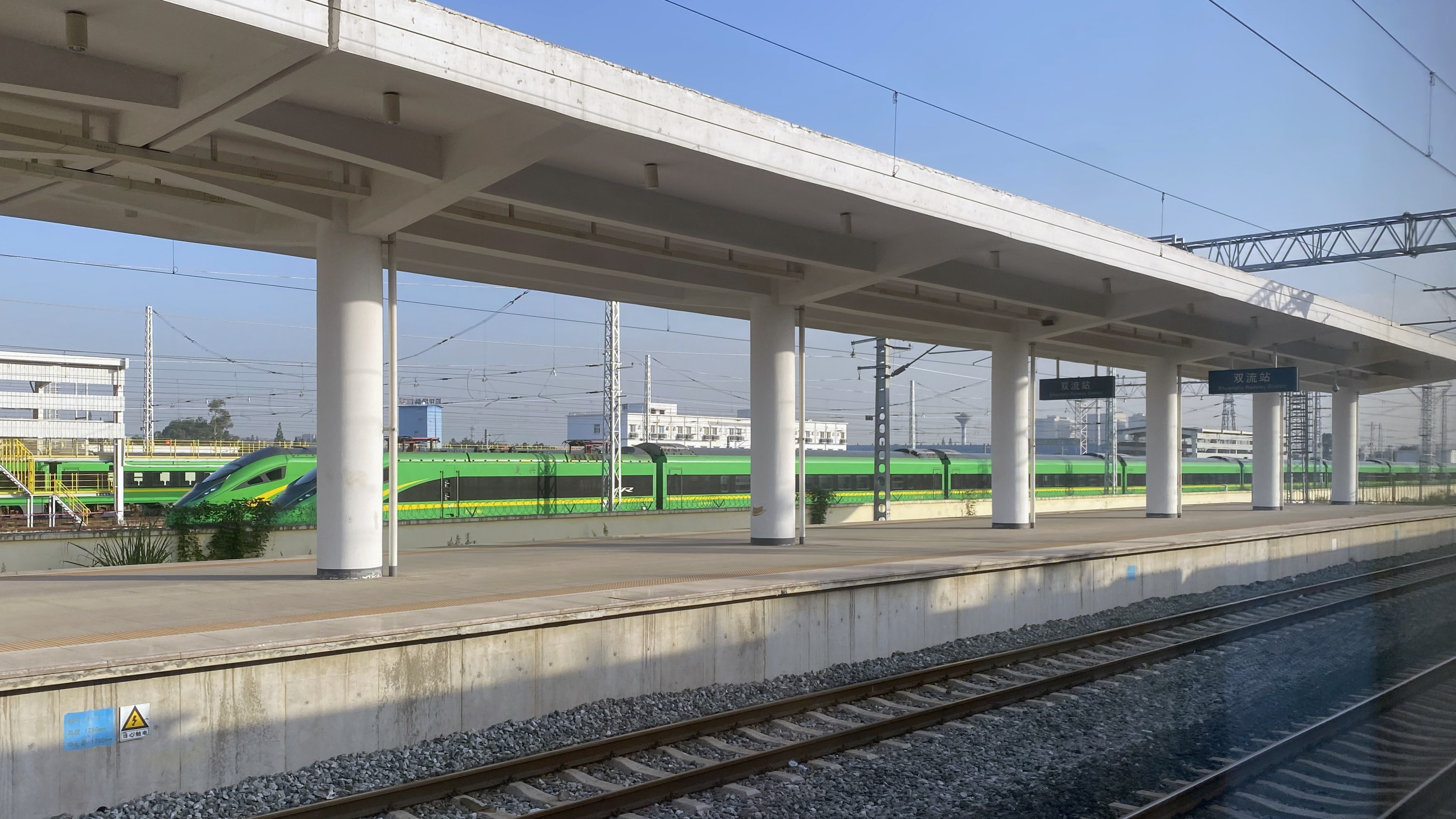 中文（中国大陆）: 几组 CR200J 在成都双流站，这里承担其整备工作